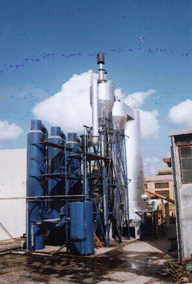 Industri berbasis pertanian